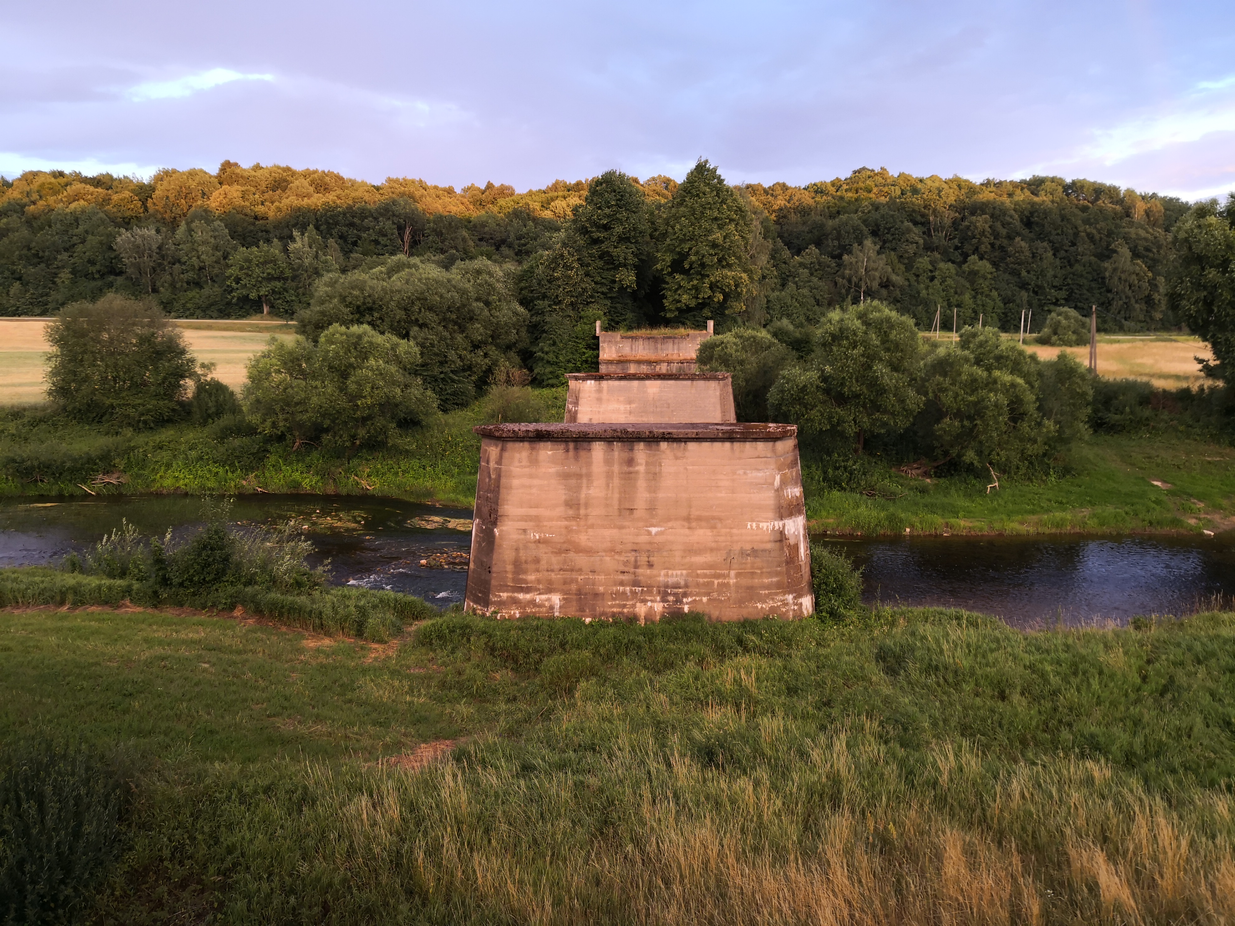 Senojo Seredžiaus tilto likučiai 2018 m. vasarą. G. Kulikausko fotografija.